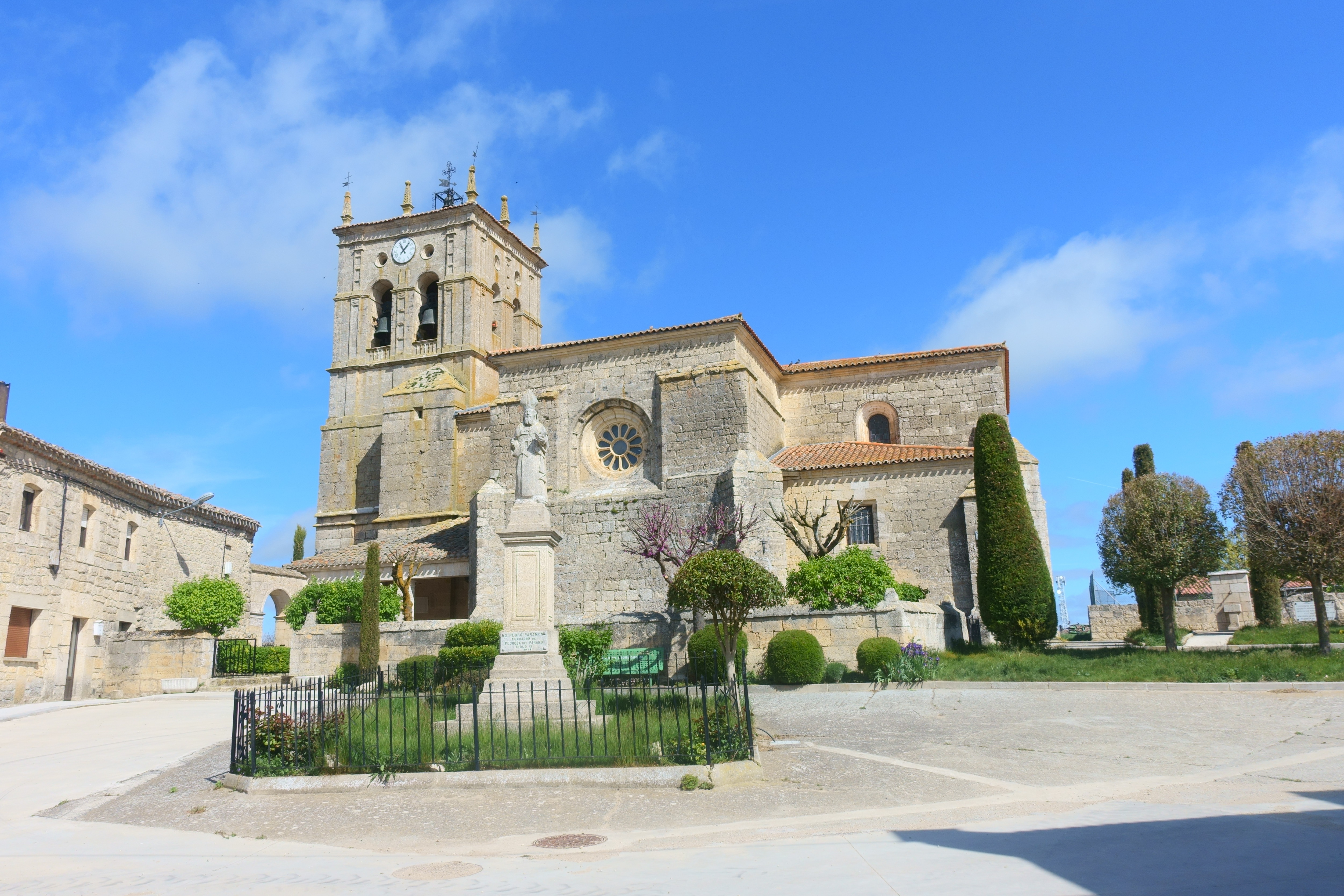 Iglesia de San Pedro, Pedrosa del Páramo (Burgos, España).